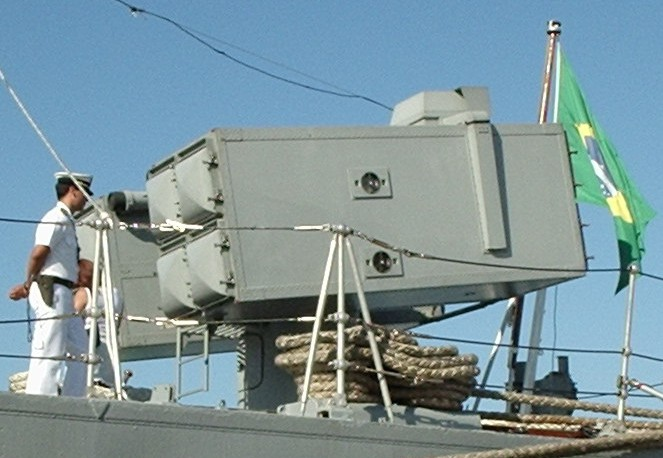 Frigate Niterói missile launcher